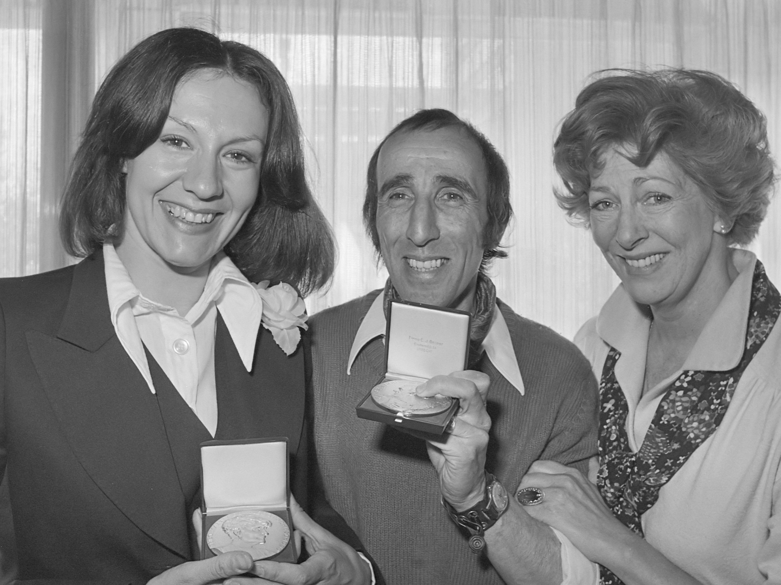 Uitreiking toneelprijzen, van links naar rechts Anne Wil Blankers, Peter van der Linden en Ellen Vogel 13 mei 1976